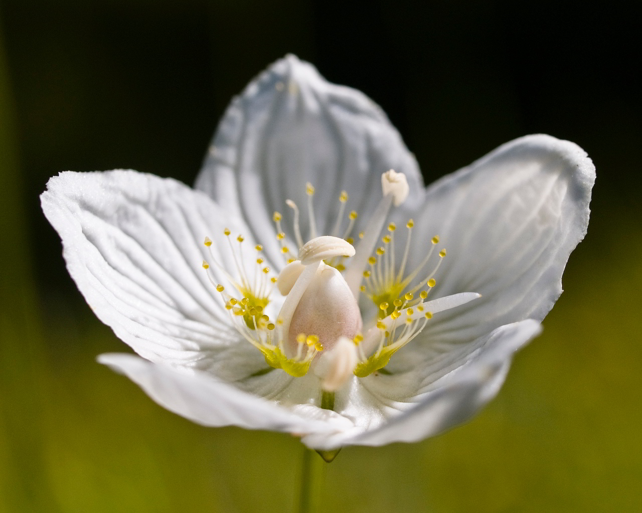 Sumpf-Herzblatt (Parnassia palustris) in der Nähe von Farchant (Bayern)